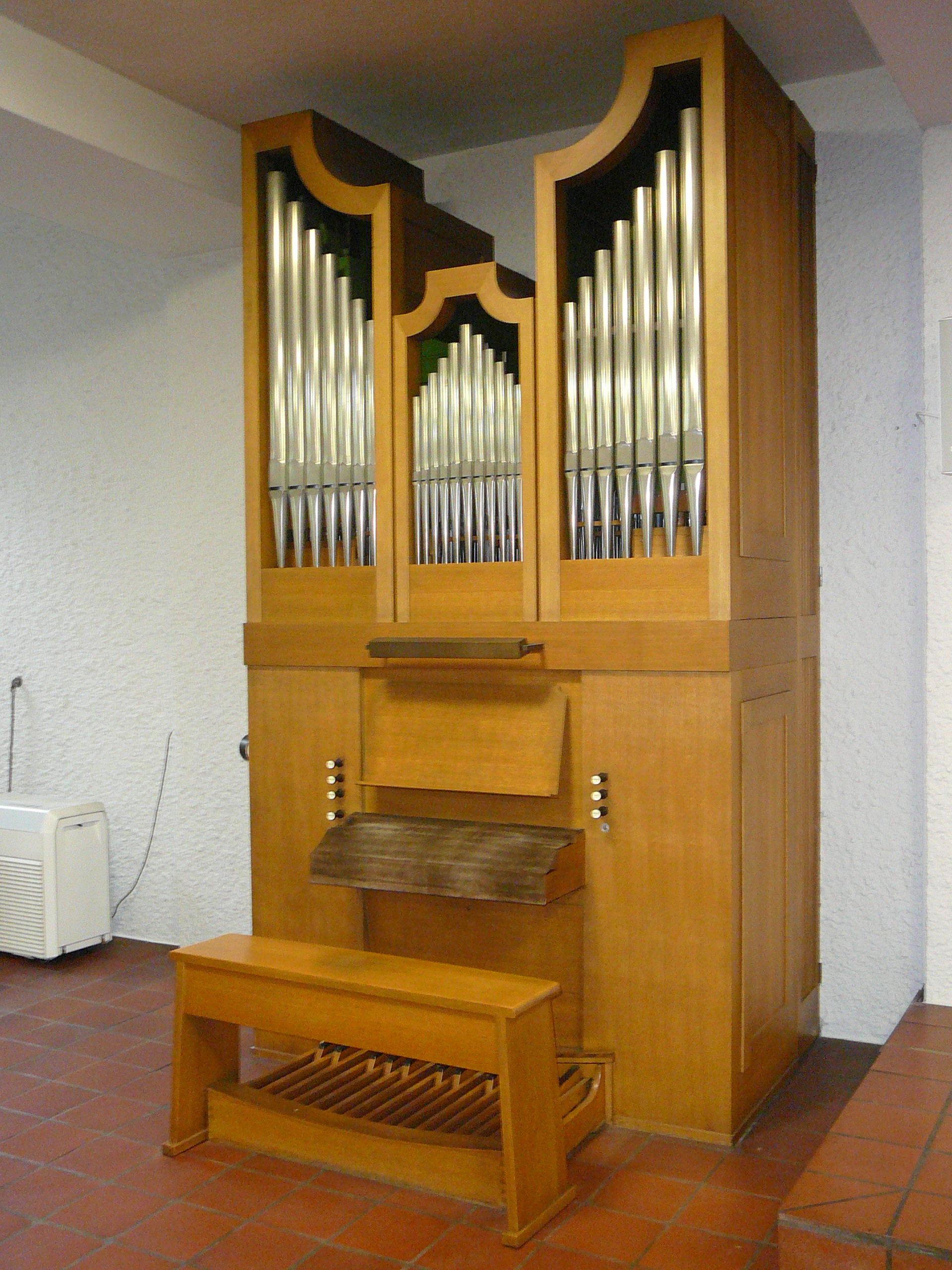 Römisch-katholische Pfarrkirche Guthirt, Zürich, Orgel in Krypta